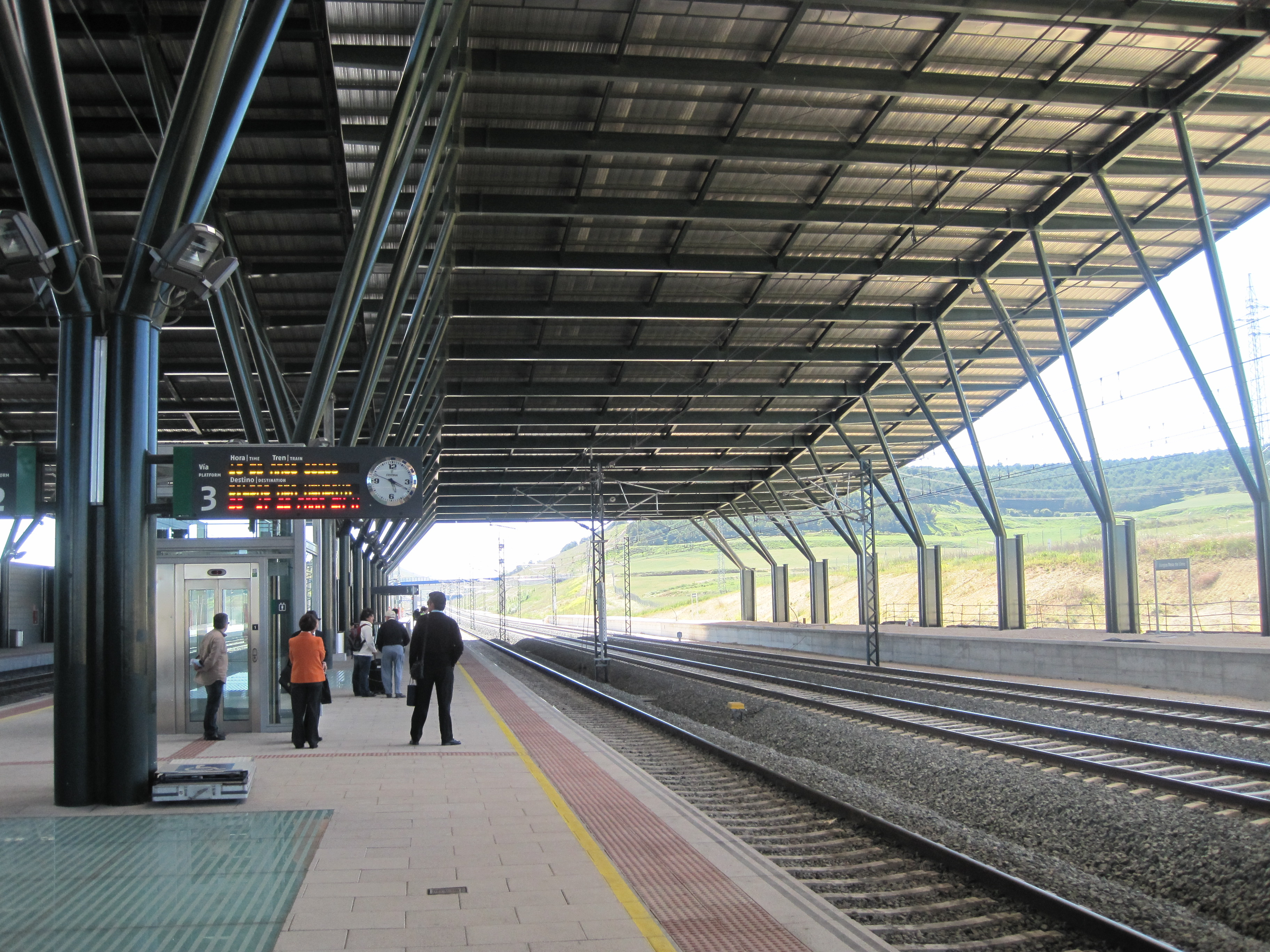 Andén nº 3 de la estación ferroviaria de Burgos Rosa de Lima.